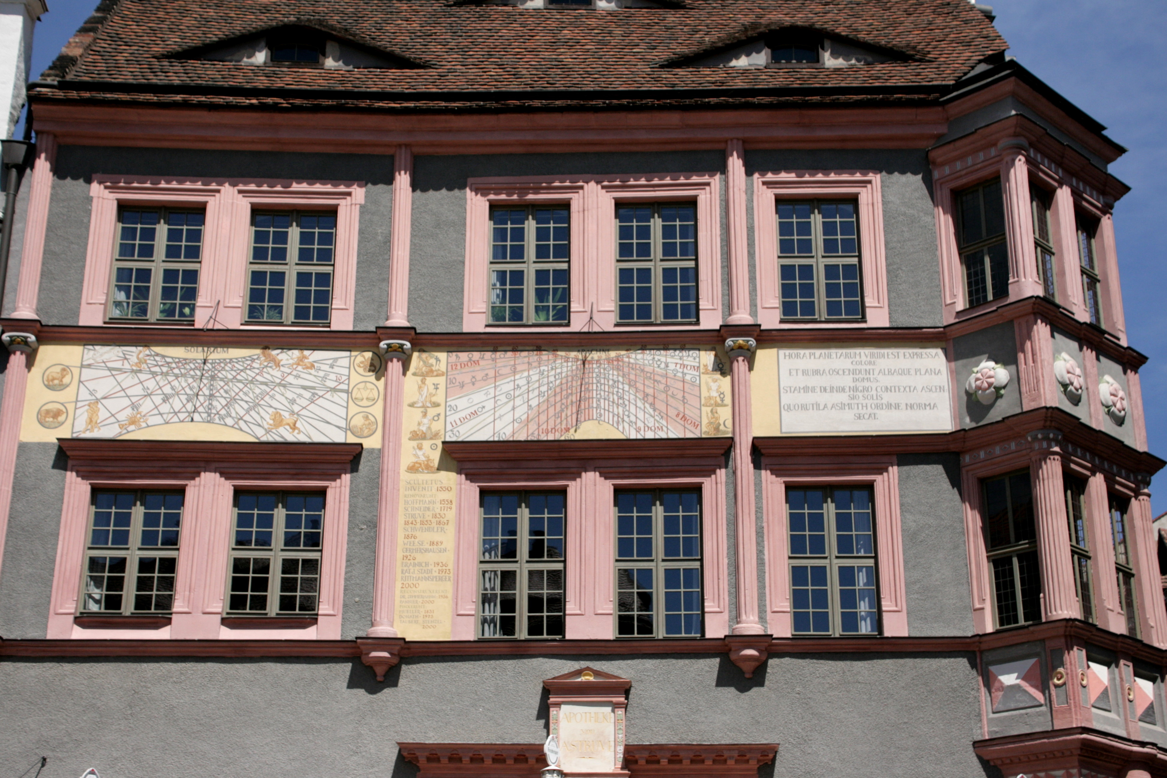 Ratsapotheke, Untermarkt 24 in Görlitz